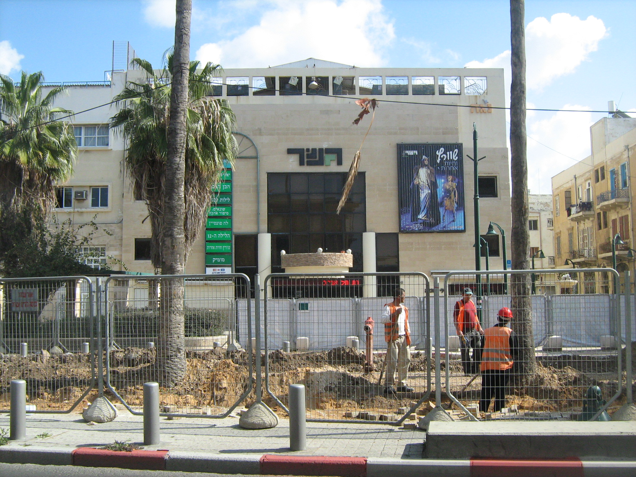 שד' ירושלים, 6 פברואר 2009